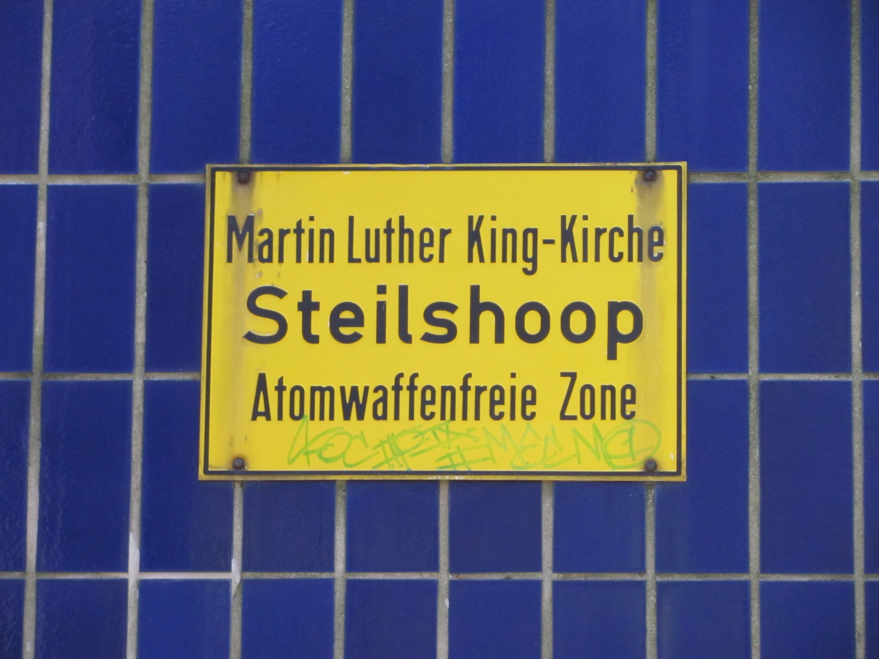 Schild an der Martin-Luther-King-Kirche, Hamburg-Steilshoop This is a photograph of an architectural monument.